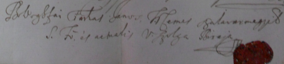 Boldogfai Farkas János (†1724) zalai helyettes főszolgabíró aláírása